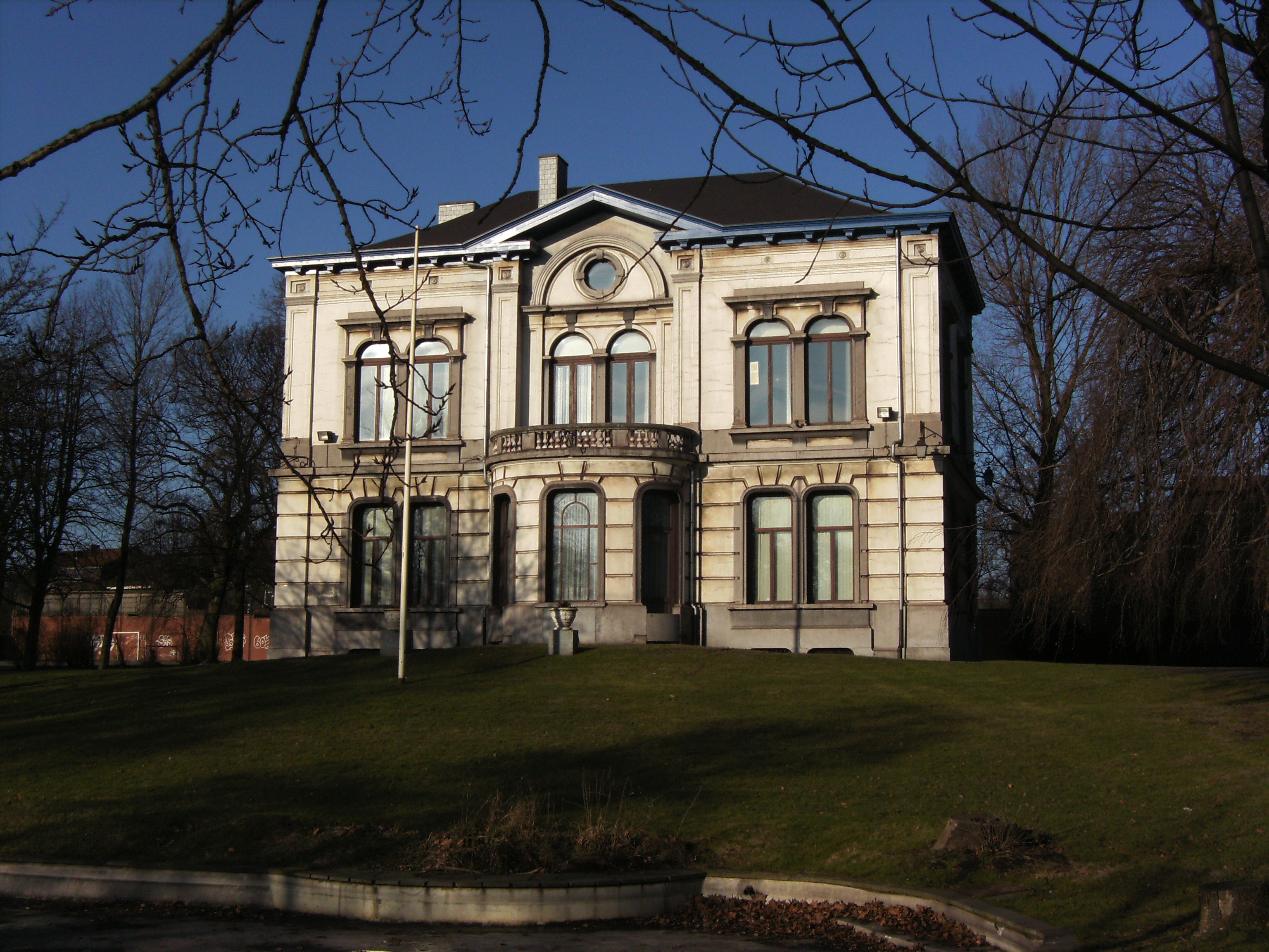 Dampremy (Charleroi) - Ancienne maison communale (droite)